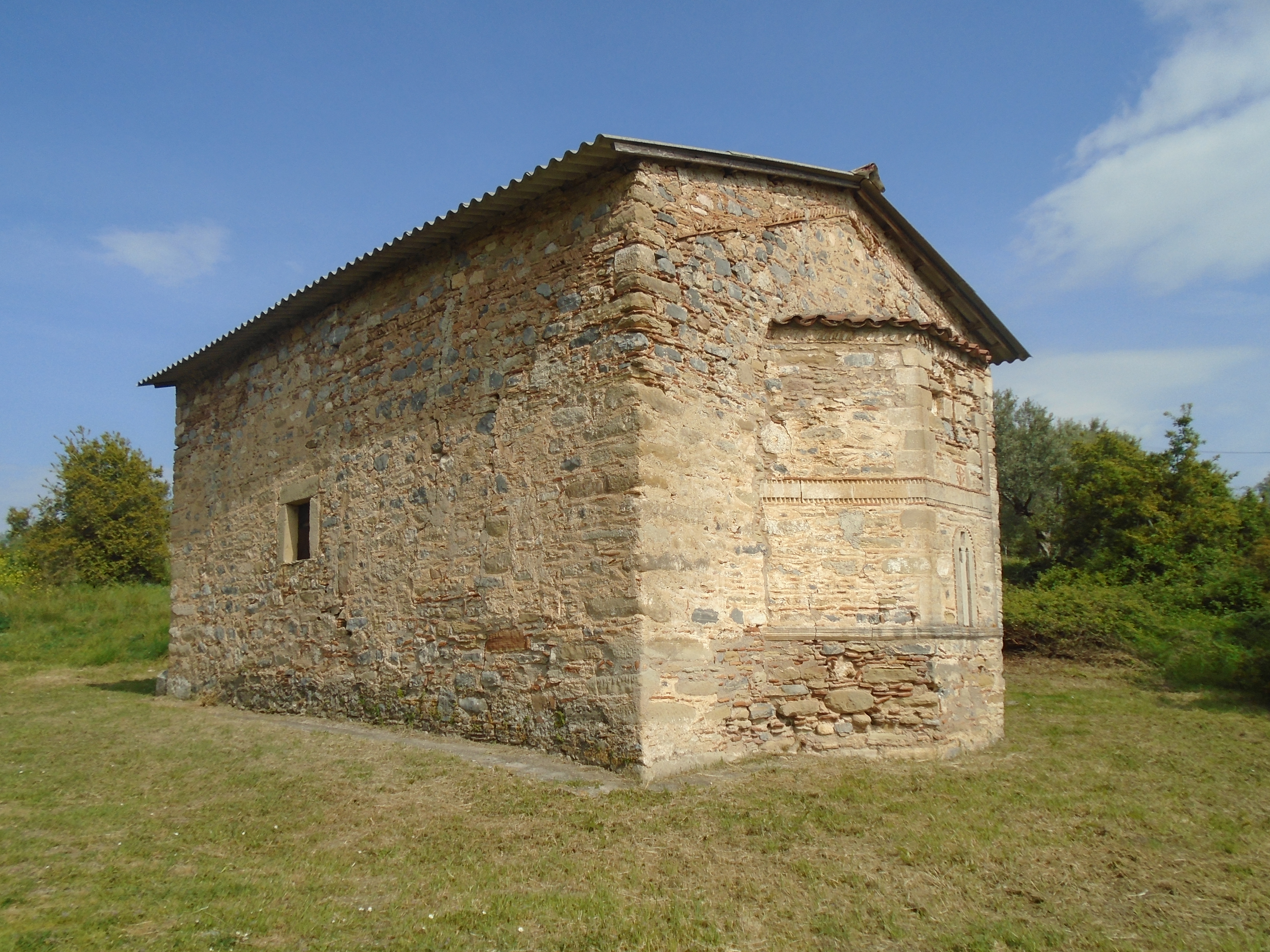 Ναός Αγίου Νικολάου στις Κορακιές. Στο παρελθόν ανήκε σε ακμάζουσα μονή, η οποία καταστράφηκε κατά την διάρκεια της επανάστασης το 1821. Η μονή είχε στην κατοχή της μεγάλες εκτάσεις με καλλιέργειες, νερόμυλο, λιοτρίβι και αλώνια. Ο ναός παρ΄ ότι έχει χαρακτηριστεί ιστορικό μνημείο με το ΦΕΚ. 12Β/ 29.4.1958, κινδυνεύει με κατάρρευση«Ναός Αγίου Νικολάου στις Κορακιές»